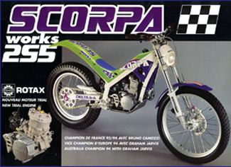 Une moto trial Scorpa WORKS.